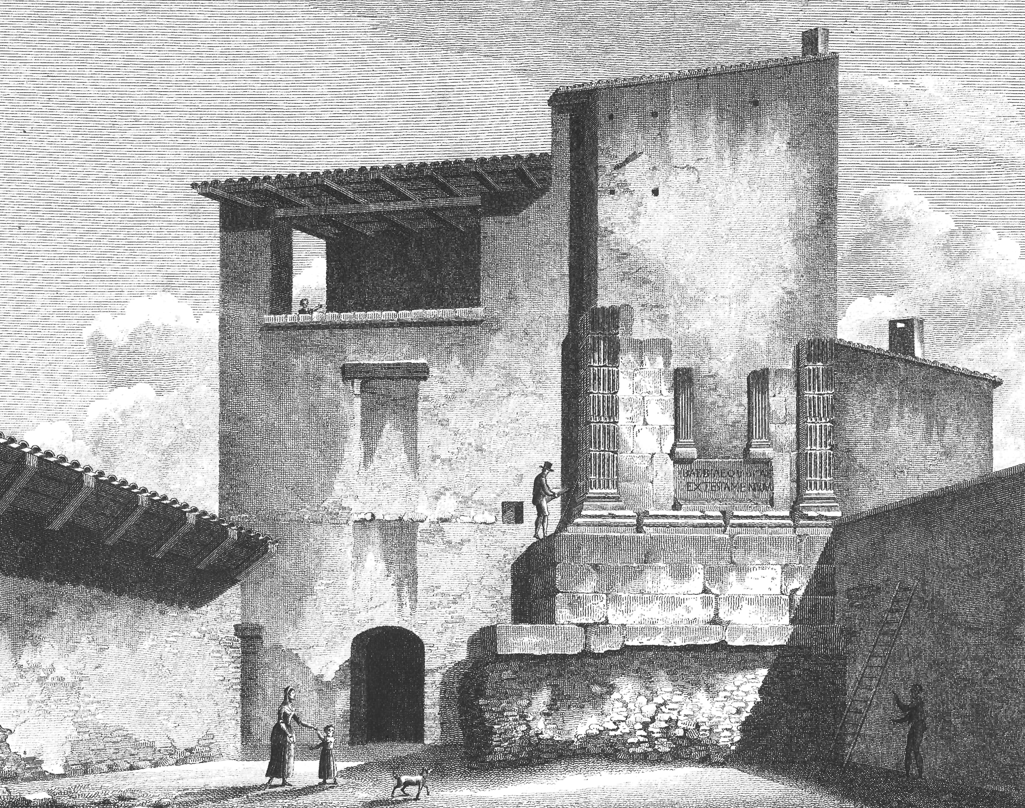 Làmina del Sepulcre de Bebia Quieta, Daimús. Obra d'Alexandre Laborde, publicada a París el 1806.